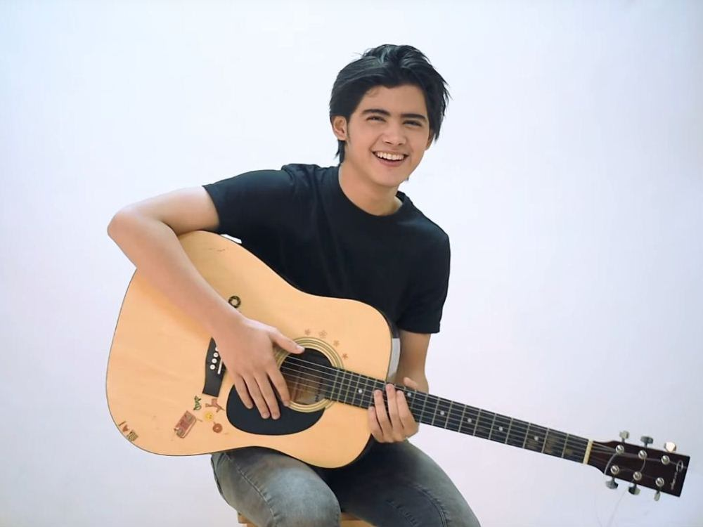 Aliando Syarief di Gogirl! TV